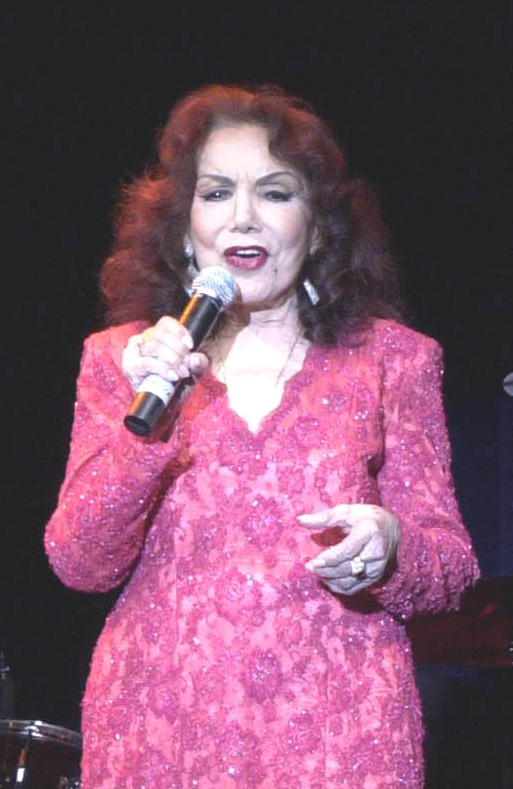 A cantora brasileira Emilinha Borba.